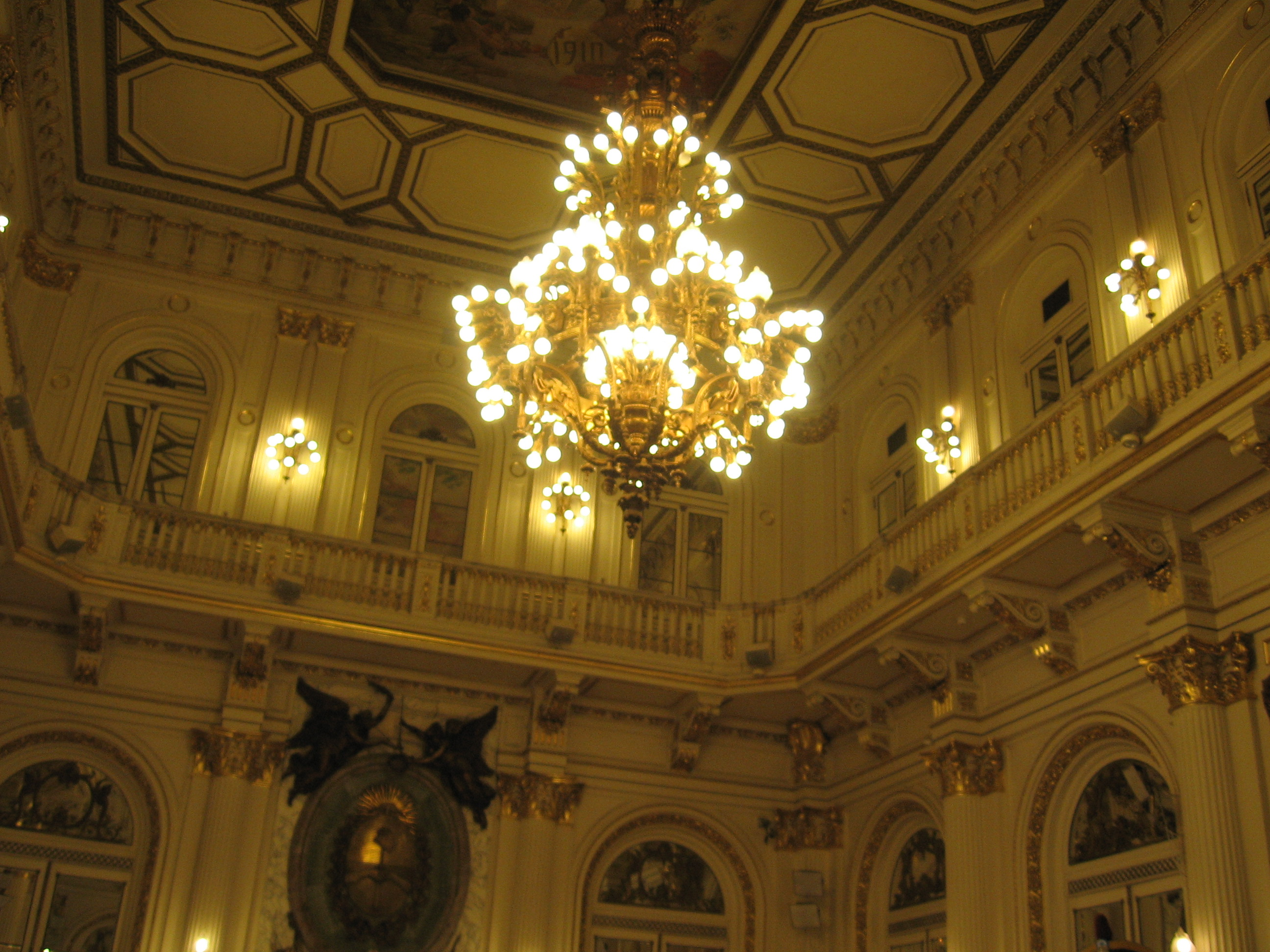 Araña del Salón Blanco de la Casa Rosada